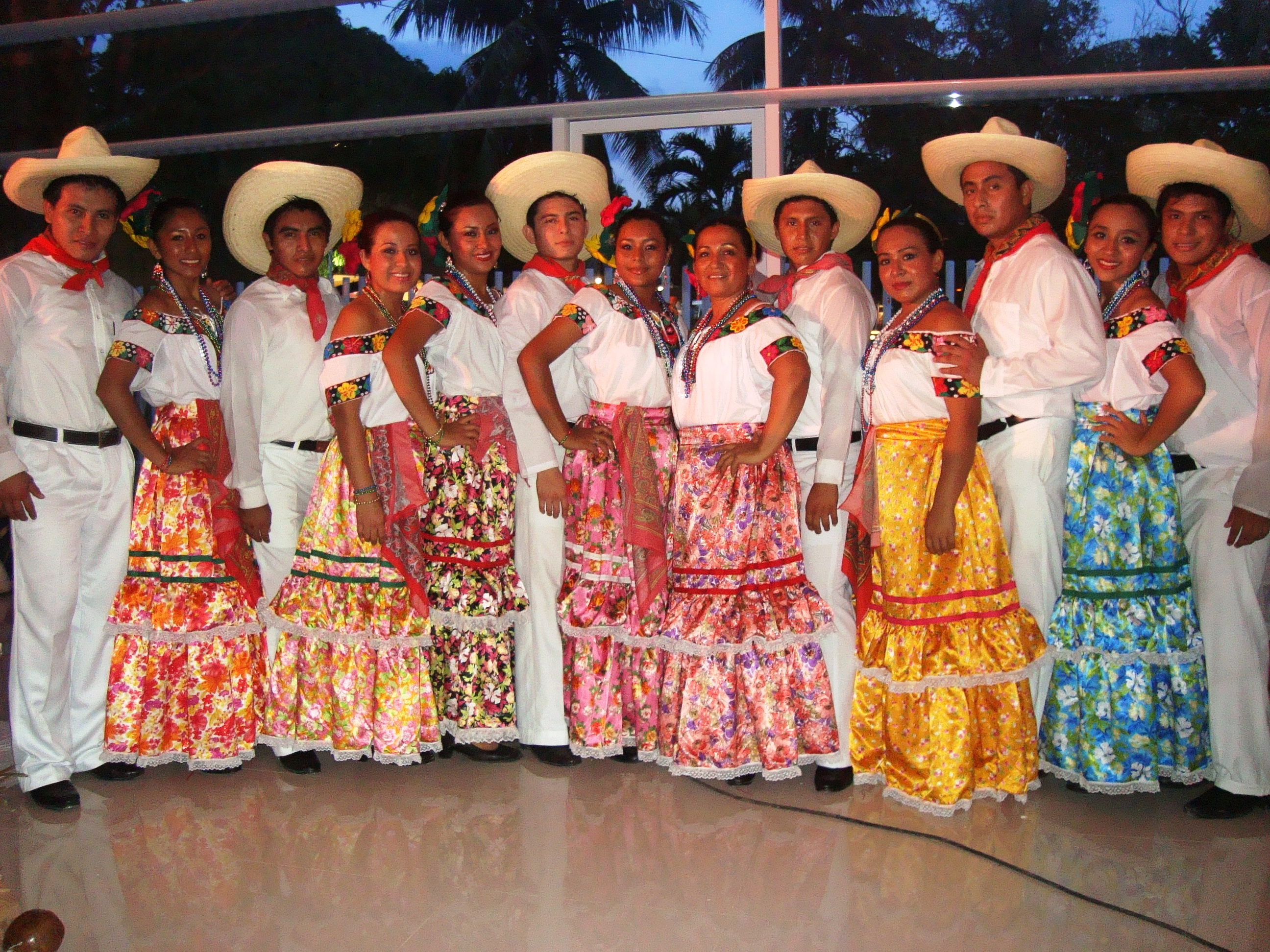 Integrantes del Ballet folclórico indígena de Tamulté de las Sabanas, municipio de Centro, Tabasco, México.